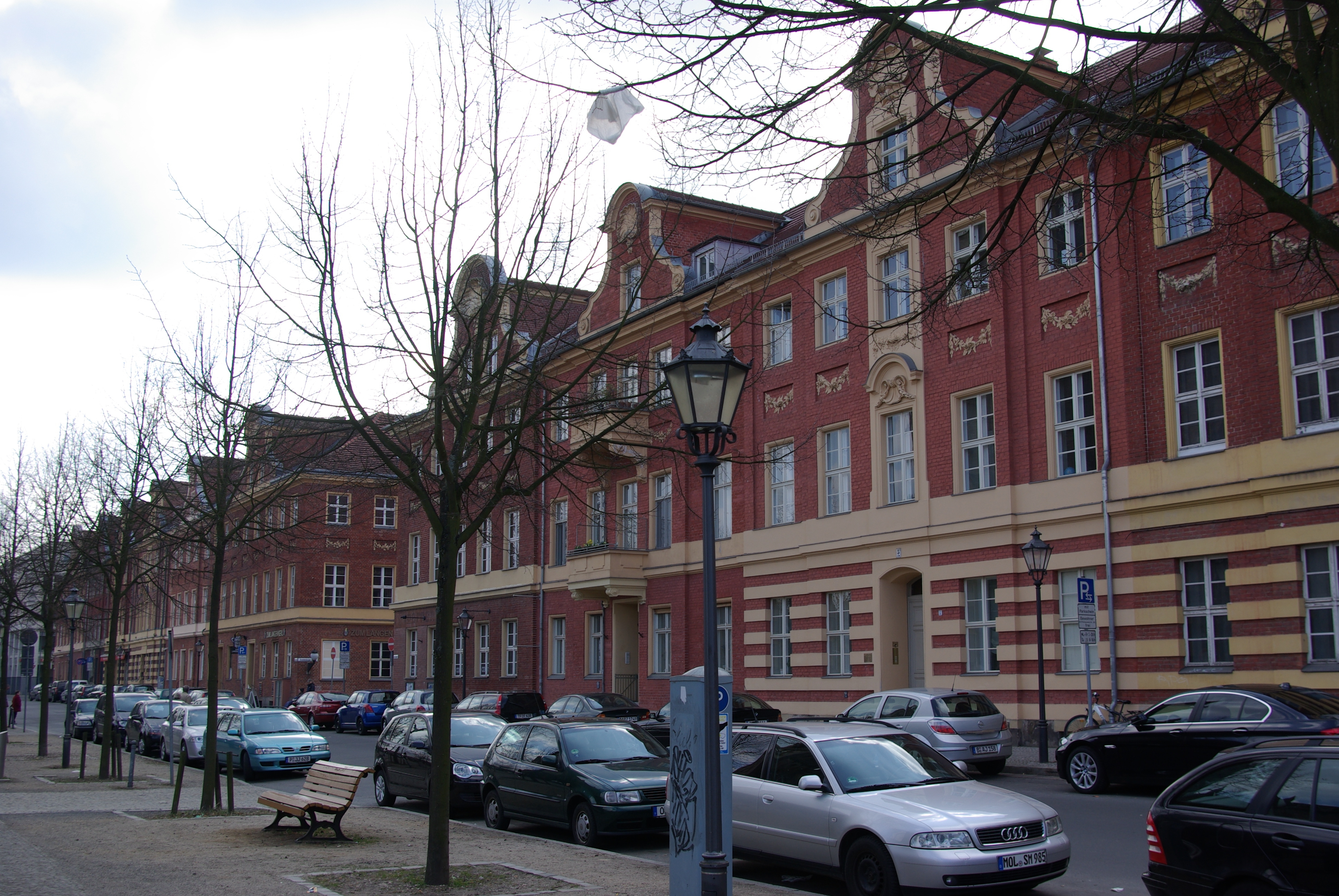 Potsdam in Brandenburg. Der Straßenzug steht unter Denkmalschutz. die Straßeneinmündug in der Mitte des Bildes ist die Brandenburger Straße.